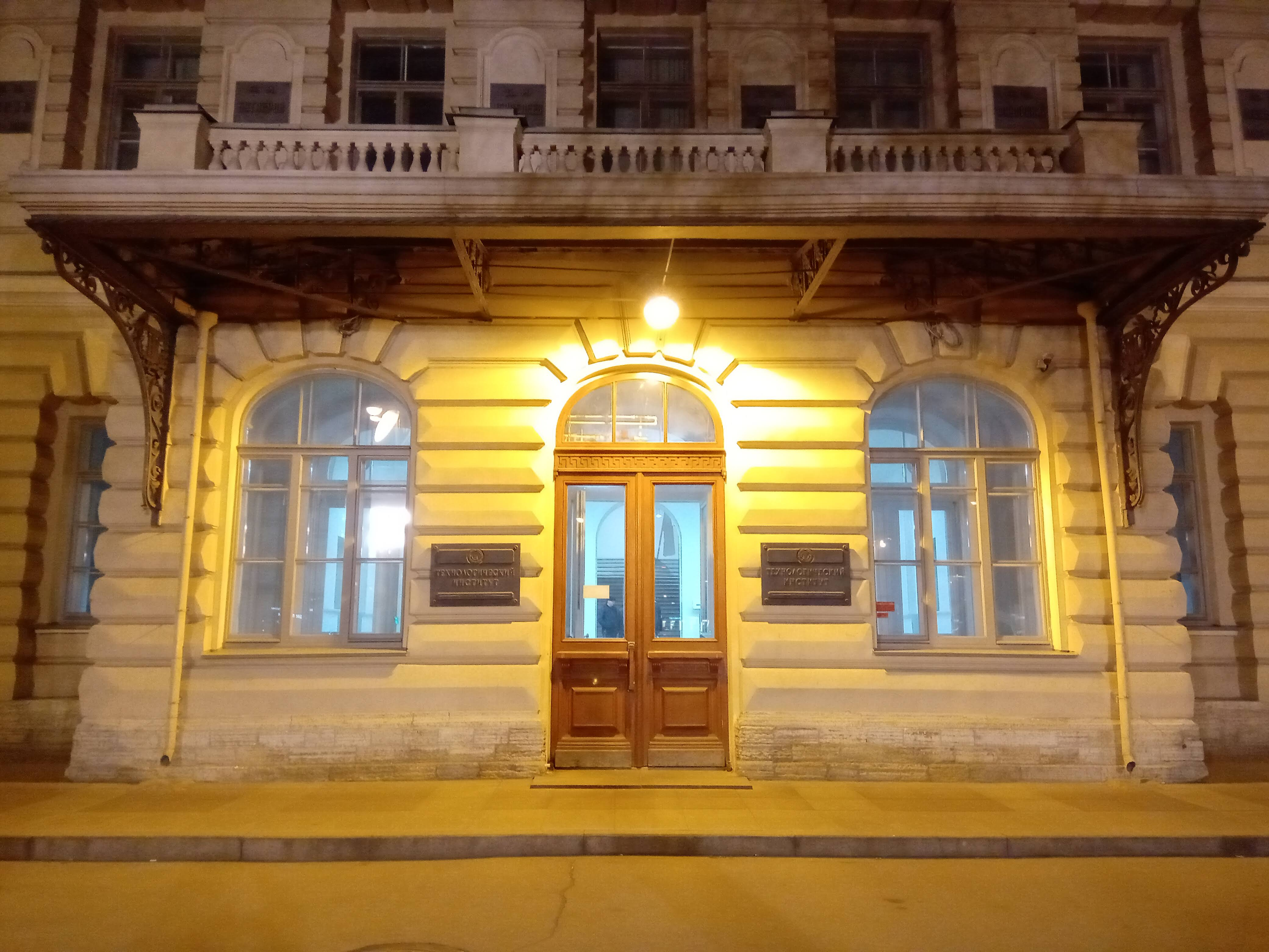 Вход в здание Технологического института в Санкт-Петербурге.